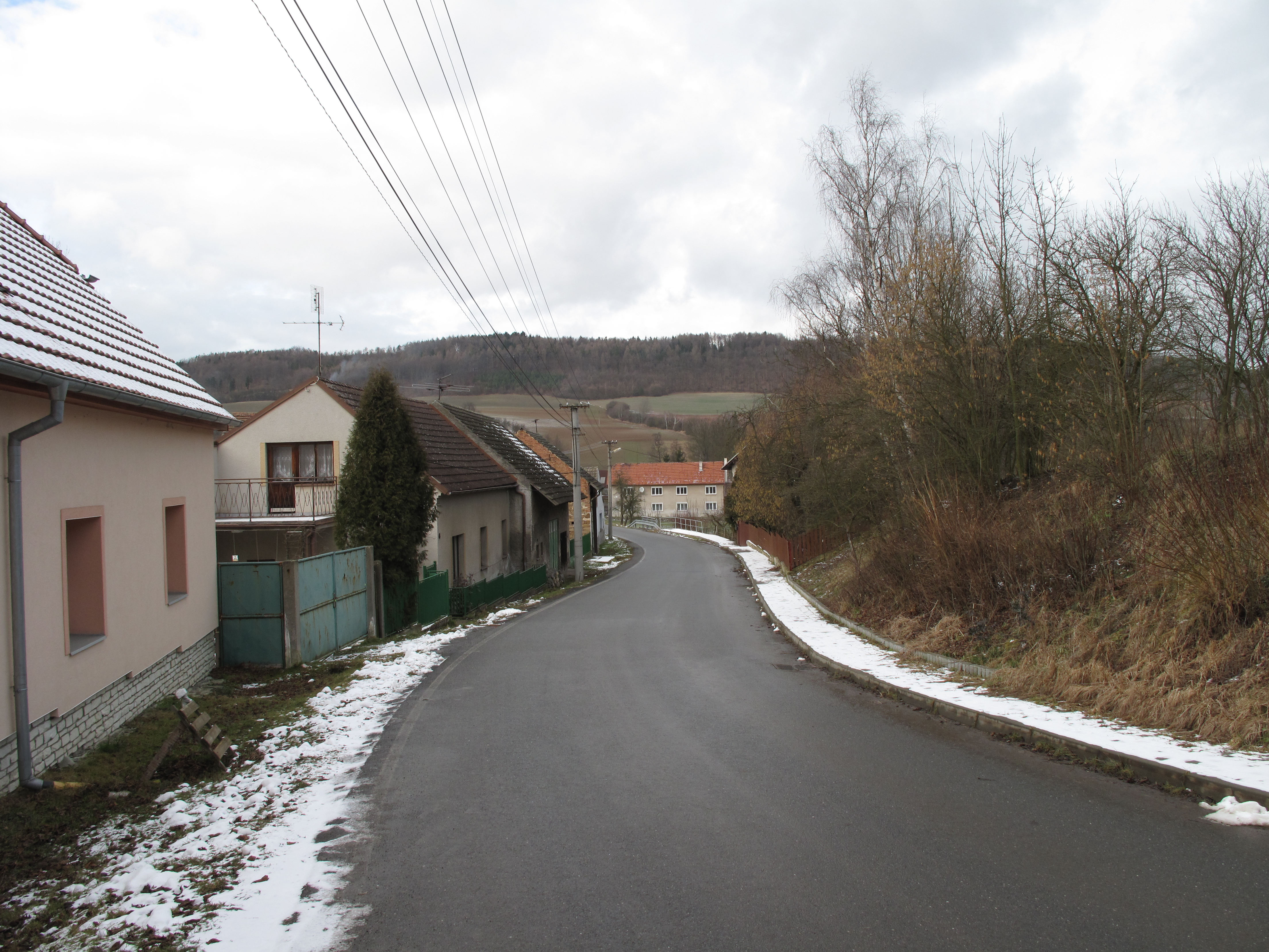 Silnice v Bdíně. Okres Rakovník, Česká republika.